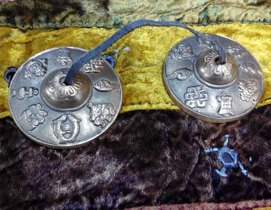 Crótalos tibetanos